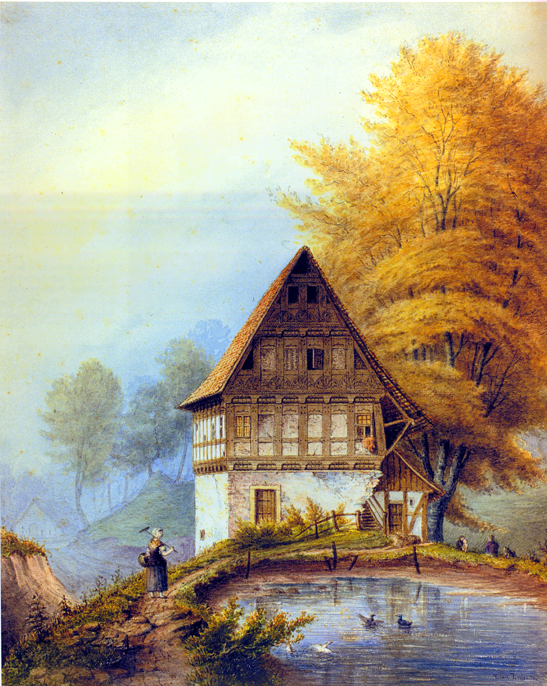 Zitiert aus der Bildbeschreibung des unten genannten Buchs: Die Schlossmühle bei Heidelbeck, ein reich verzierter Fachwerkbau von 1587. Aquarell von 1874 (WV 363).